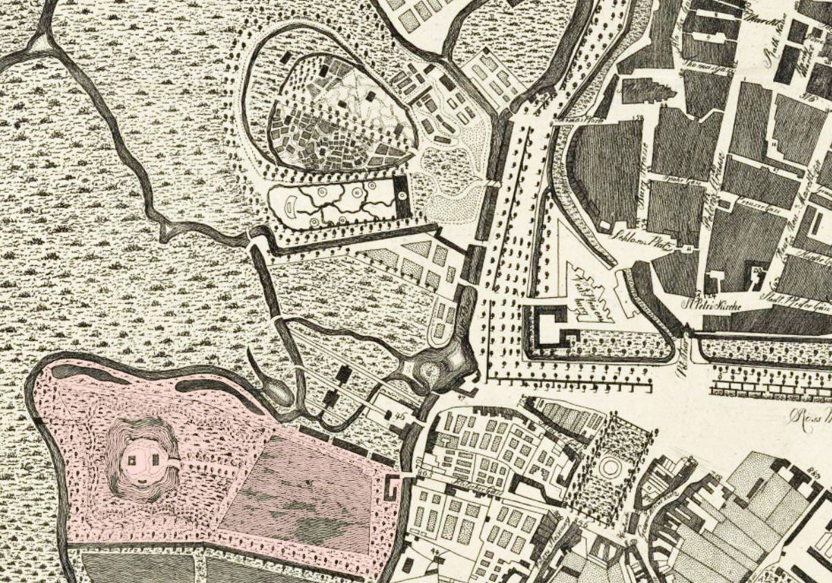 Markierte Lage von Triers Garten in Leipzig auf einem Plan von 1796